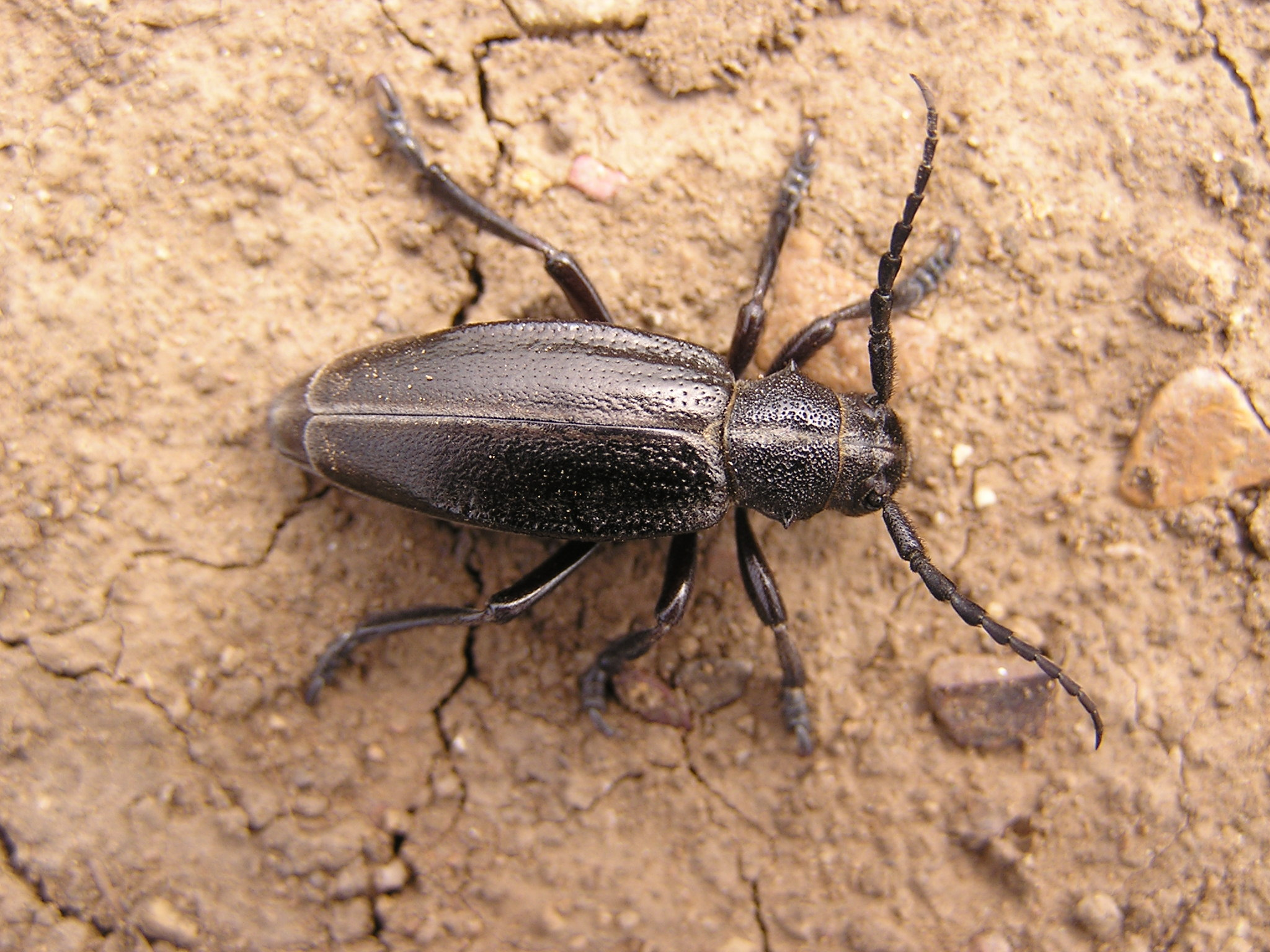 Жук-усач Dorcadion sp. (Coleoptera: Cerambycidae). Снято в Донецке в апреле.